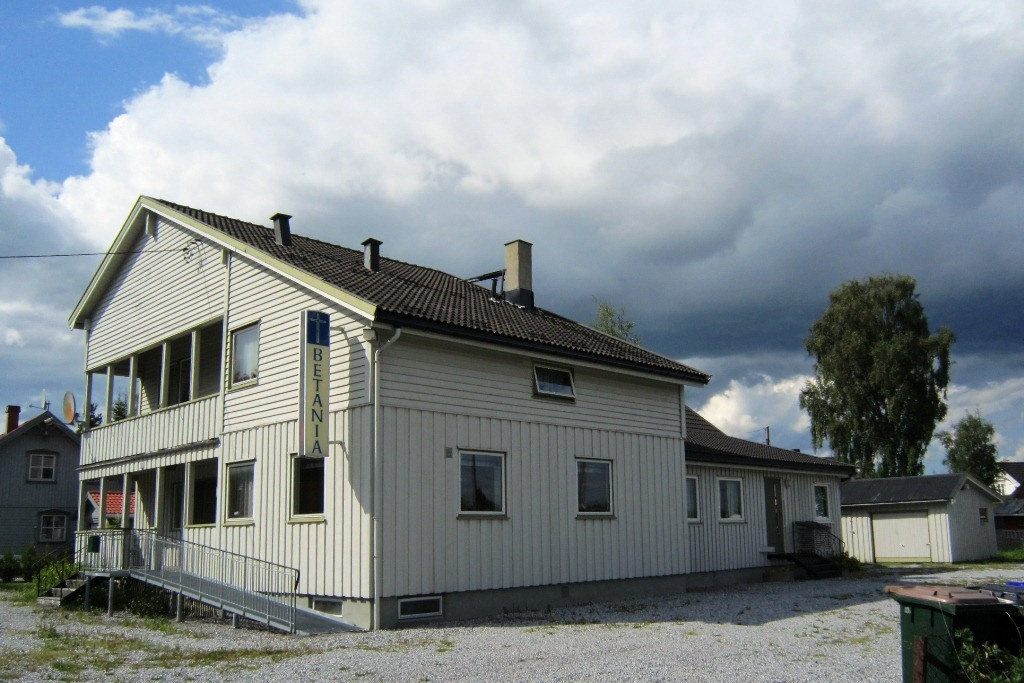 Betania Årnes